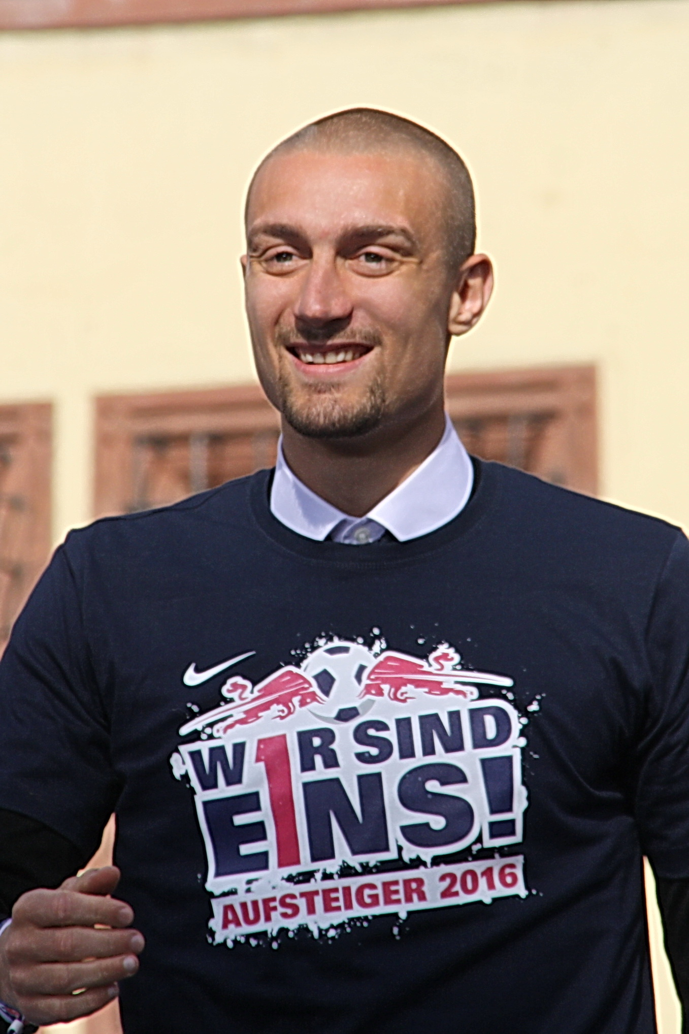 Stefan Ilsanker bei der Aufstiegsfeier RB Leipzig 2016